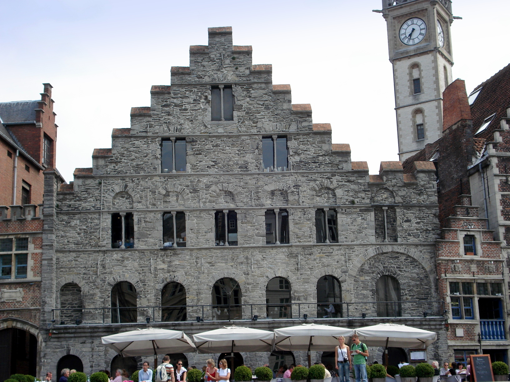 Gent, Graslei: Oude Spijker Gand, Belgique, le quai aux Herbes: le Spijker ou Étape au Blé.